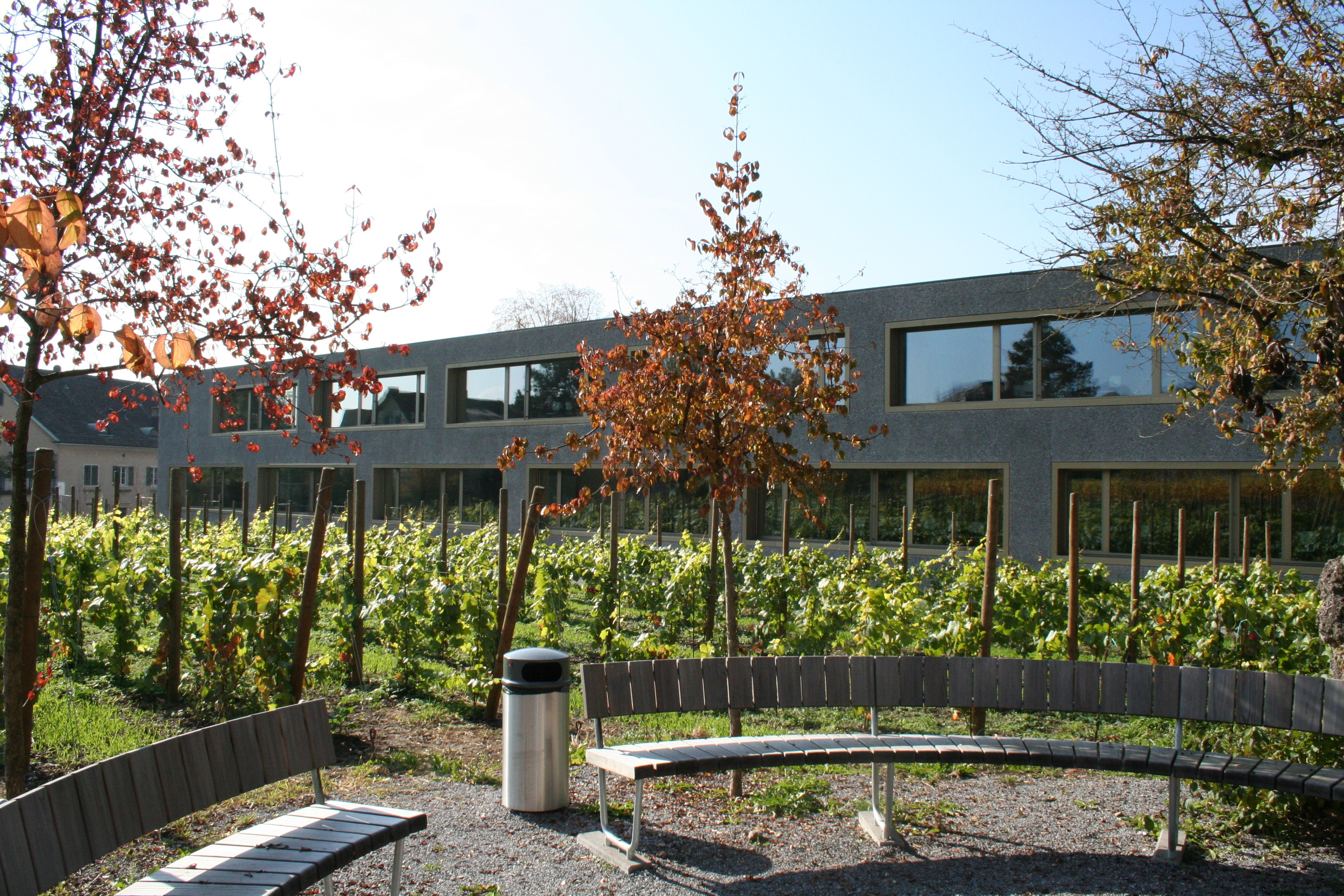 Kantonsschule Küsnacht, Klassentrakt Ostseite